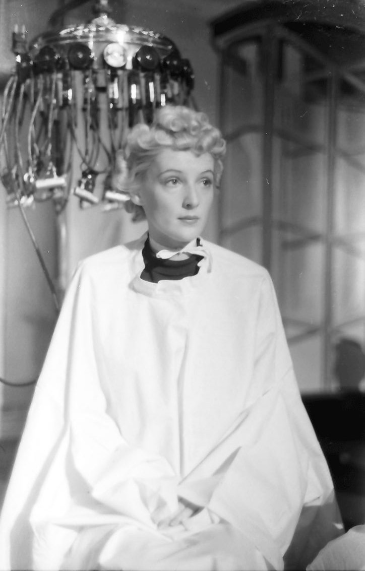 Kabarett der Komiker; Gisela Schlüter unter Friseurhaube